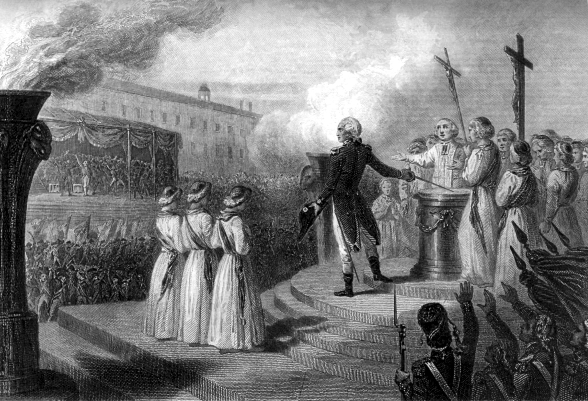 Marquis de Lafayette at Fête de la Fédération 14 july 1790